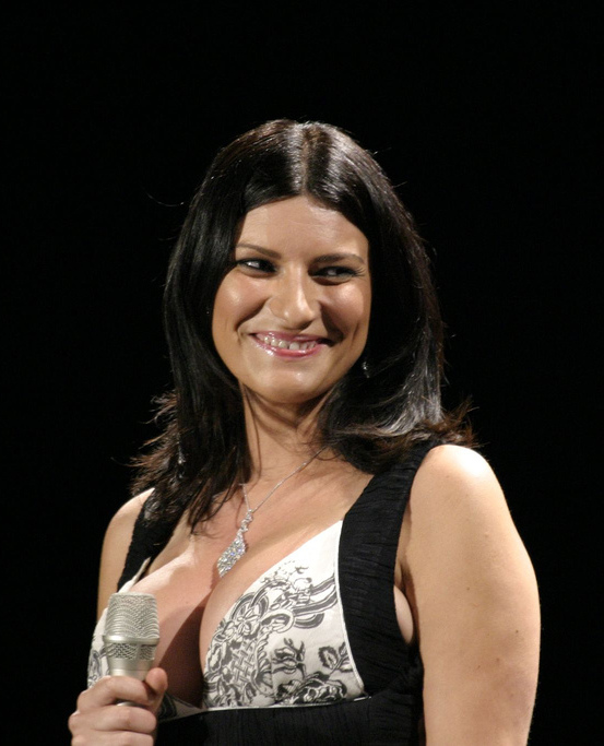 Laura Pausini, Festival Teatro-Canzone Giorgio Gaber, Viareggio, 21-07-2007